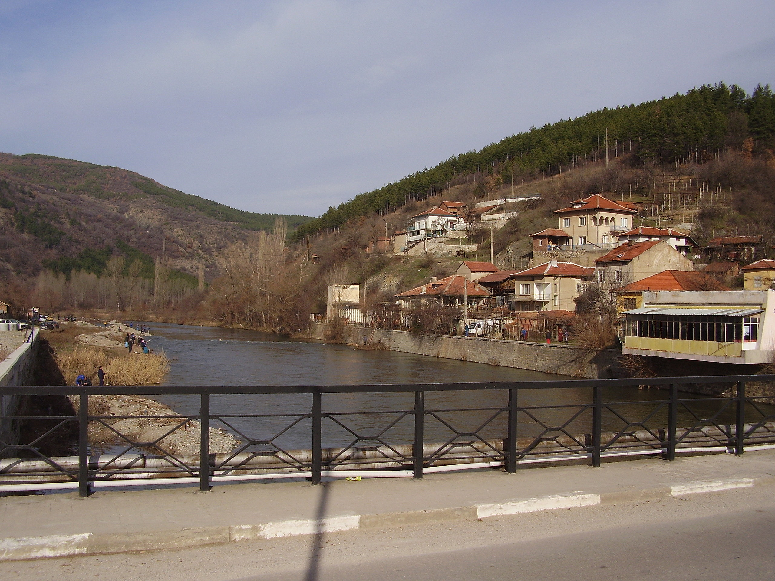 Бобошево - моста над Струма